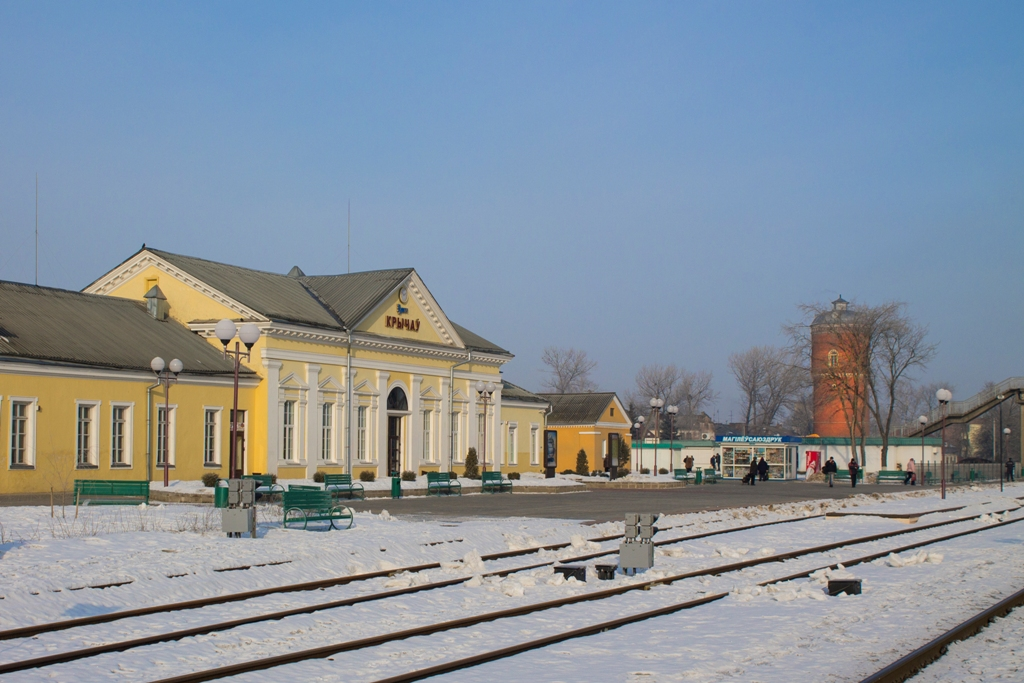 Крычаў. Чыгуначны вакзал